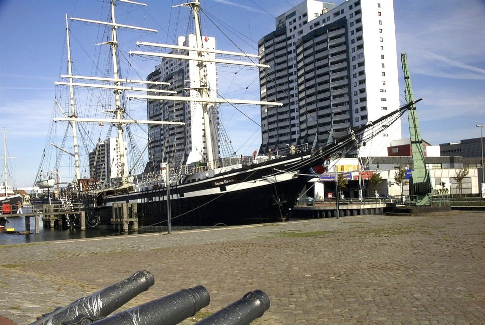 Bremerhaven Skyline